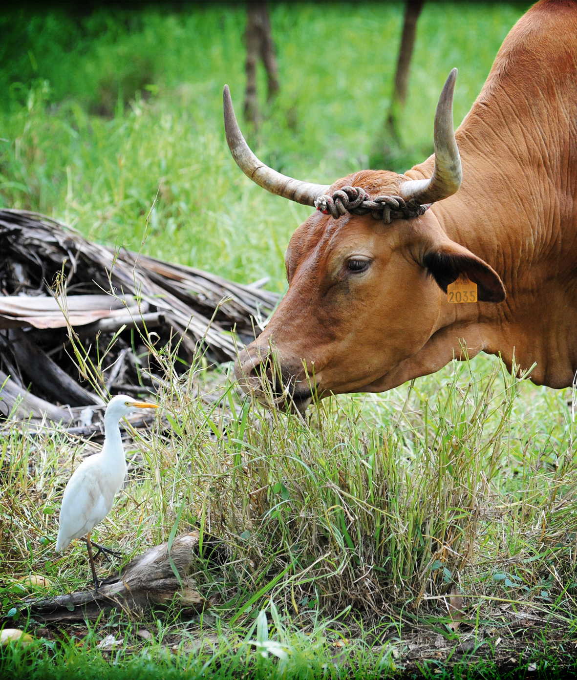 Un Pic boeuf et son boeuf en pleine conversation. Photographié en Guadeloupe.